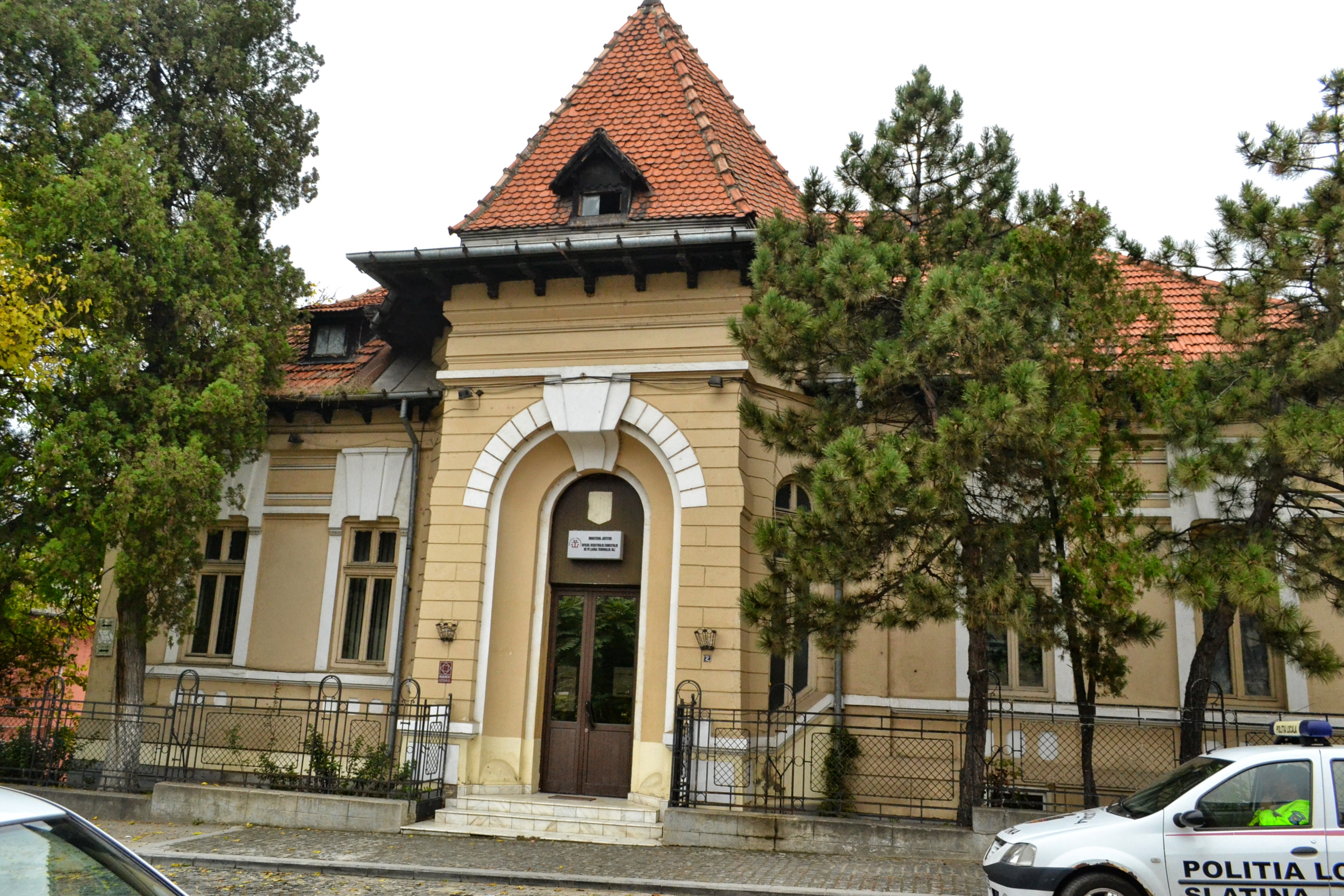 Registrul Comerțului